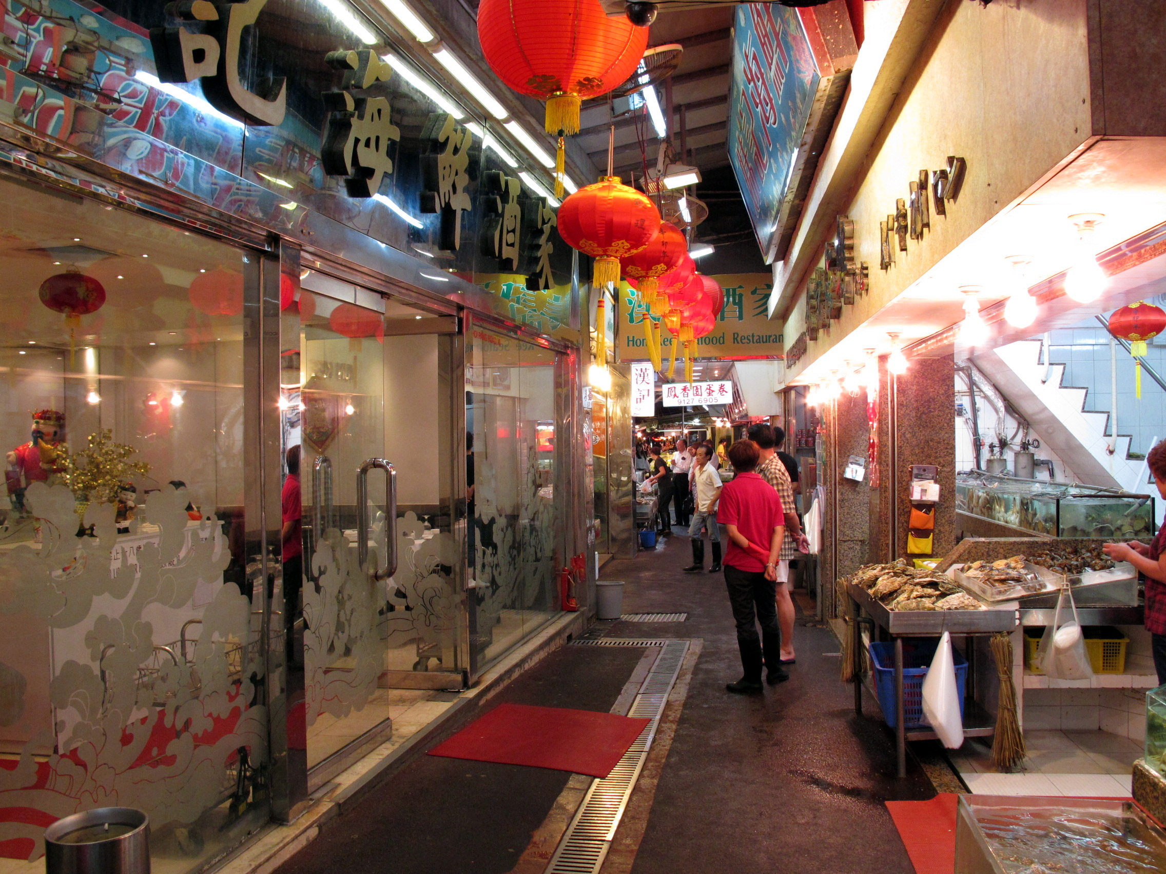 Sam Ka Tsuen Restuarants